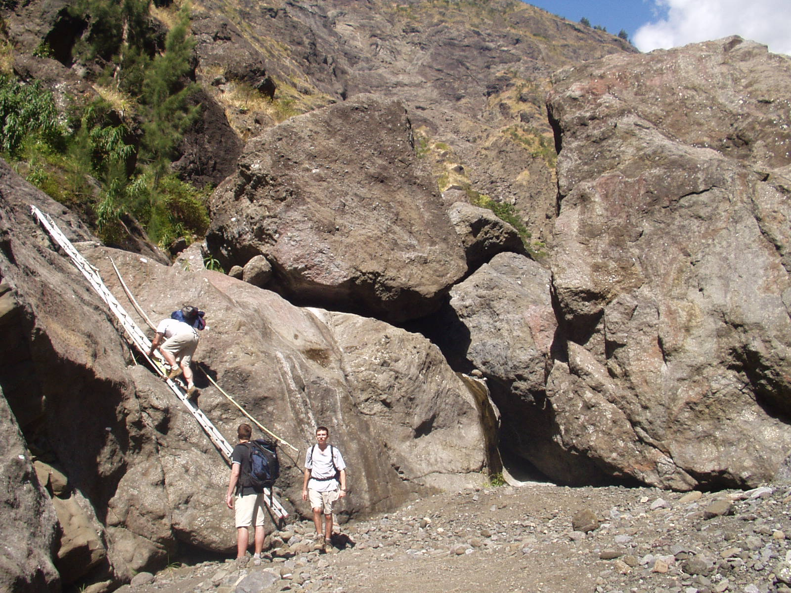 Des échelles sur un sentier à Mafate.